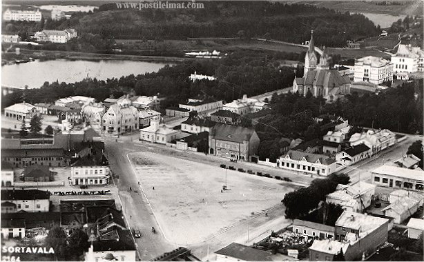 Сортавала в начале 20-ого века